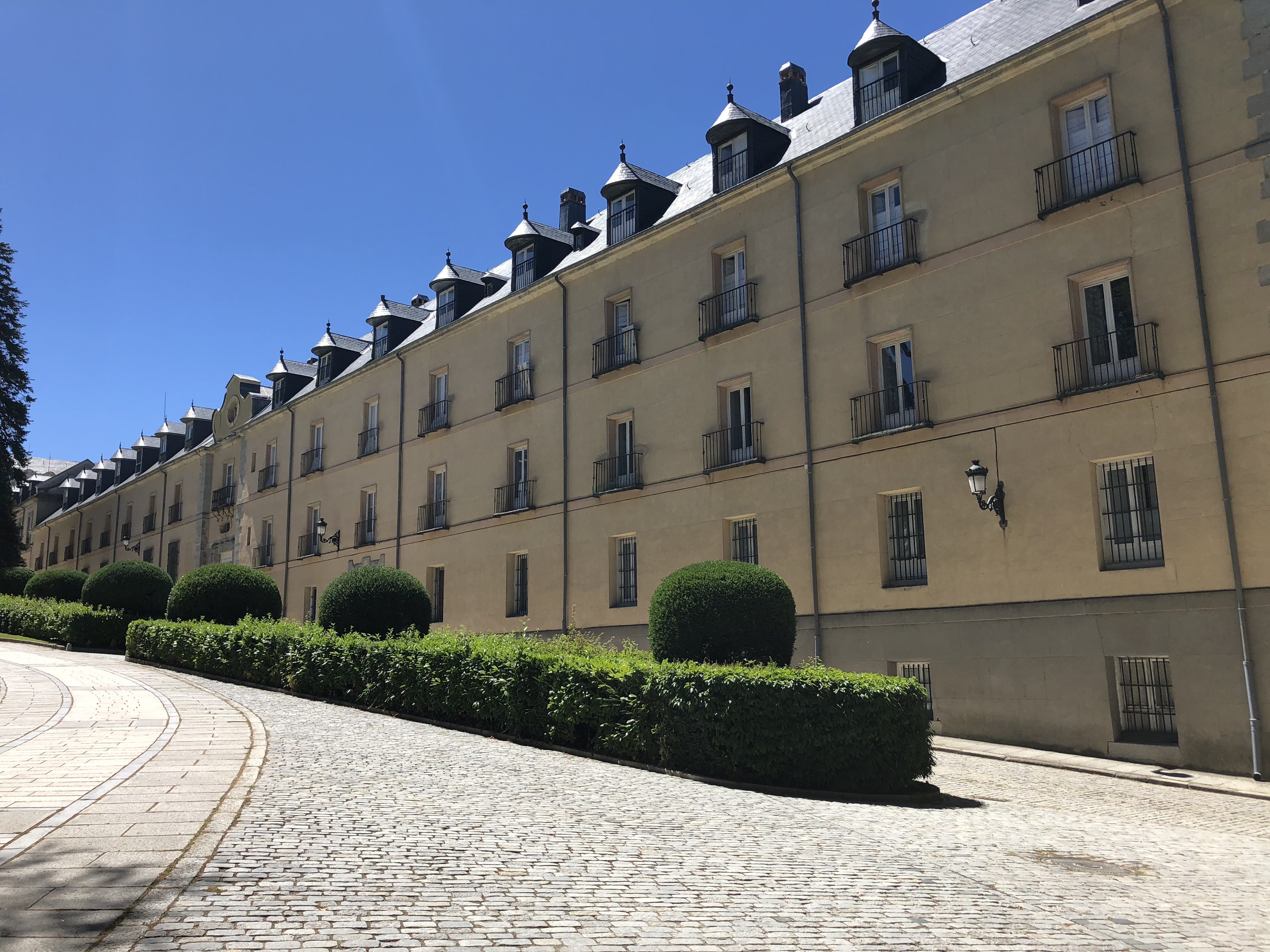 Fachada norte de la casa de oficios del Real Sitio de San Ildefonso